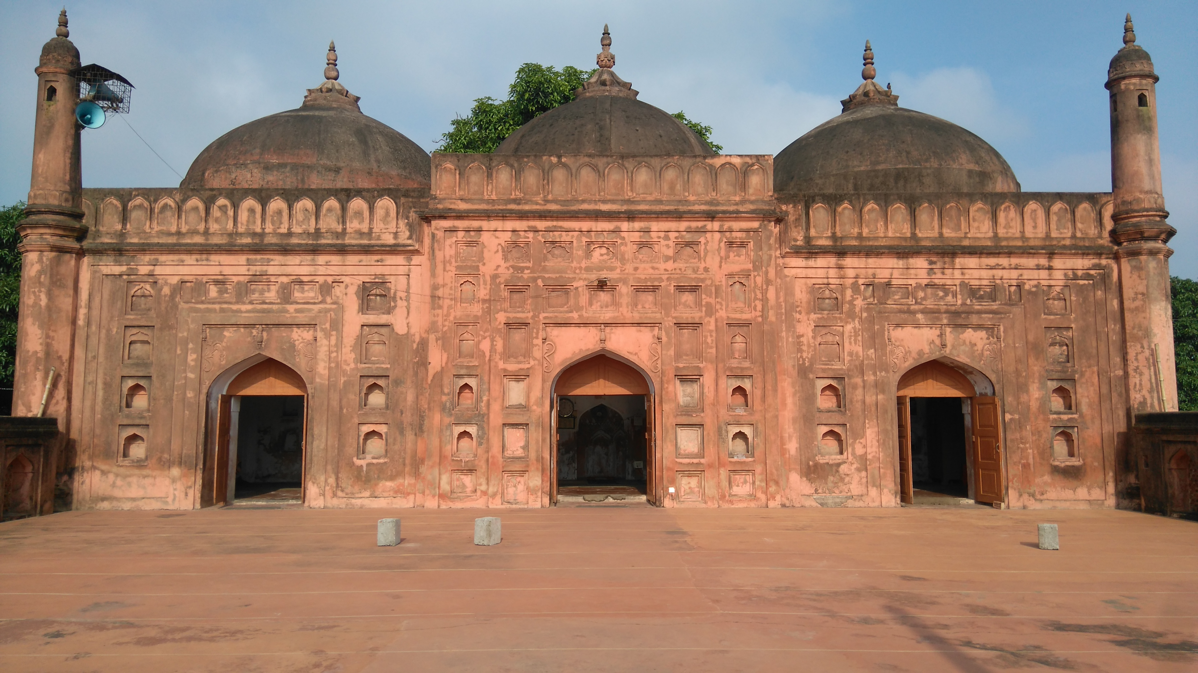 শাহ নেয়ামত উল্লাহ ওয়ালী মসজিদ ,শিবগঞ্জ উপজেলা, চাঁপাইনবাবগঞ্জ জেলা, রাজশাহী এর সম্মুখ ভাগের ছবি